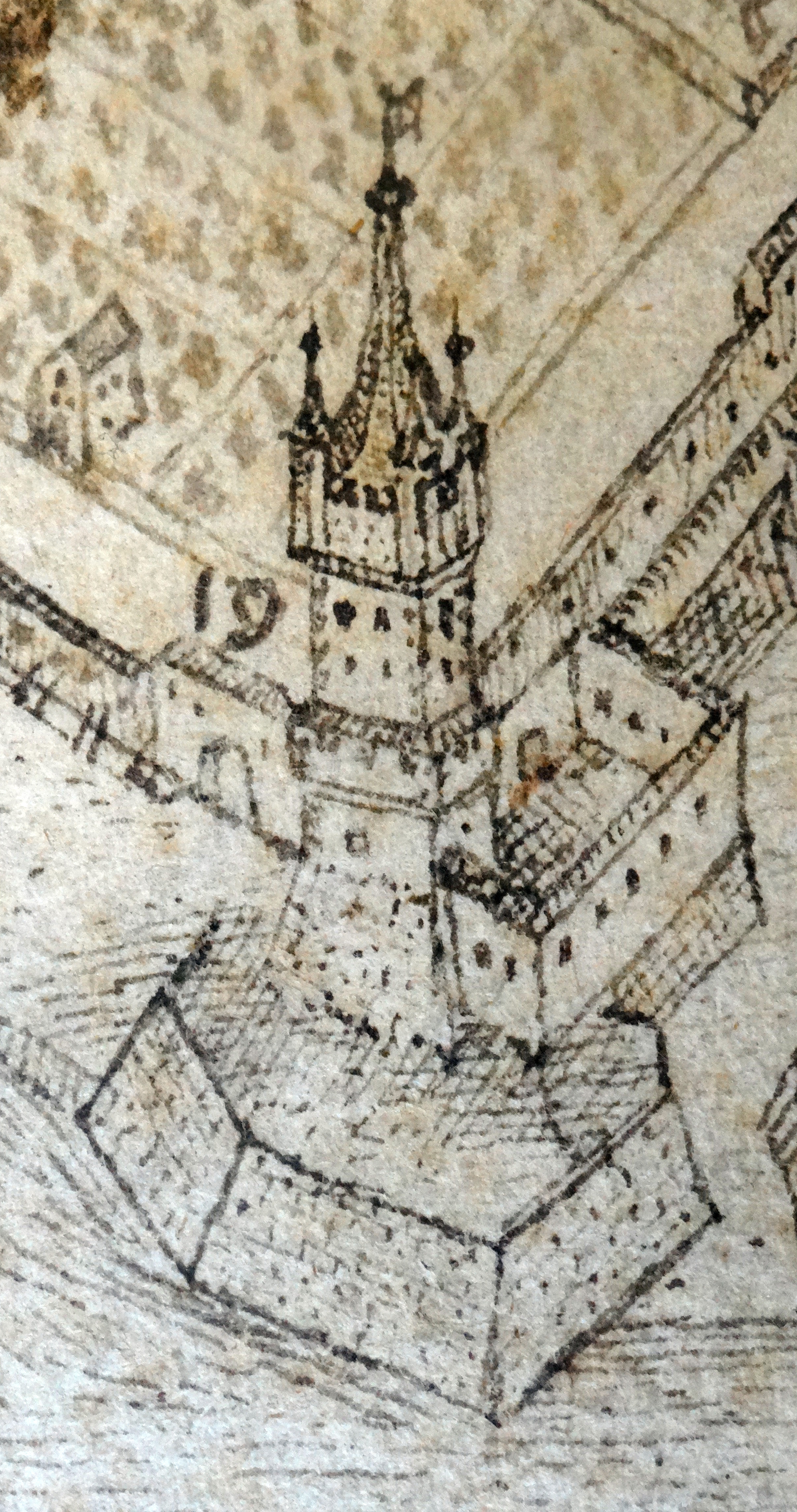 Neuturm, Worms. Detail aus: Peter Hamman: Statt Wormbß wie selbige 1631 vor dem Schwedischen Ruin der Vorstätt [...] verblieben. Stadtarchiv Worms, Abt. 1B, Nr. 48.